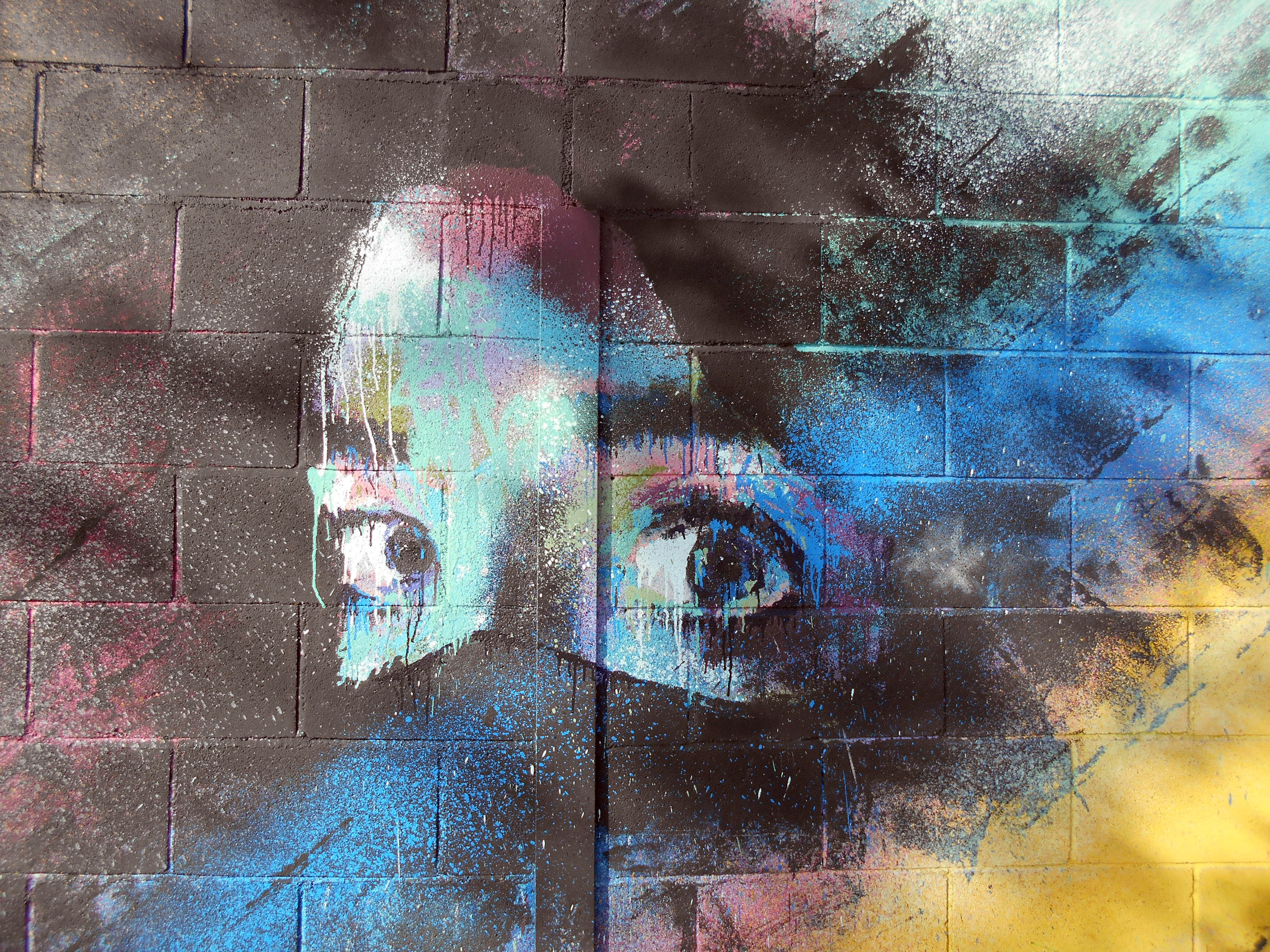 Graffiti en Barcelona